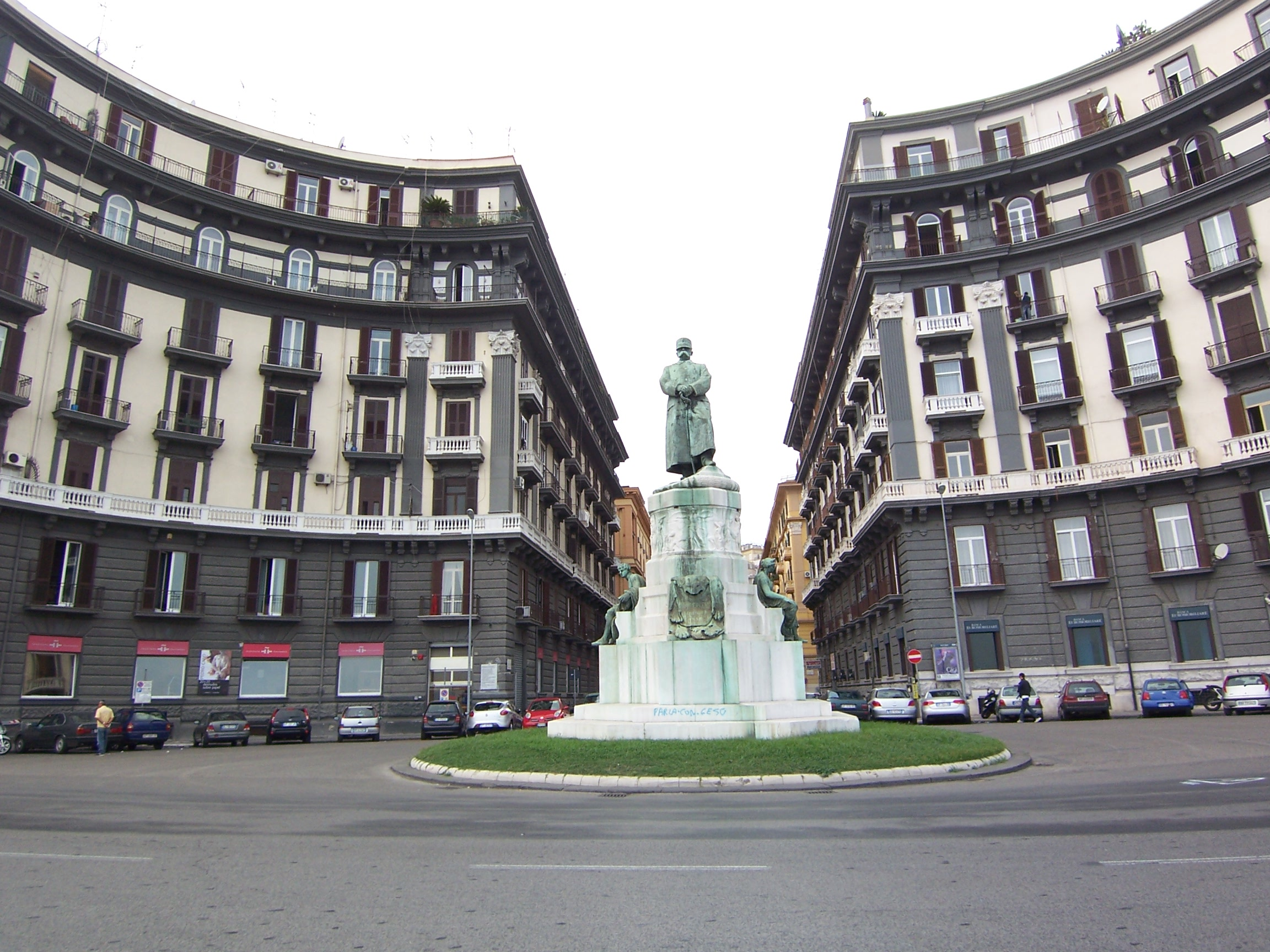 Monumento ad Umberto I, Re d'Italia, sul lungomare di Napoli (via Nazario Sauro), opera di Achille d'Orsi.